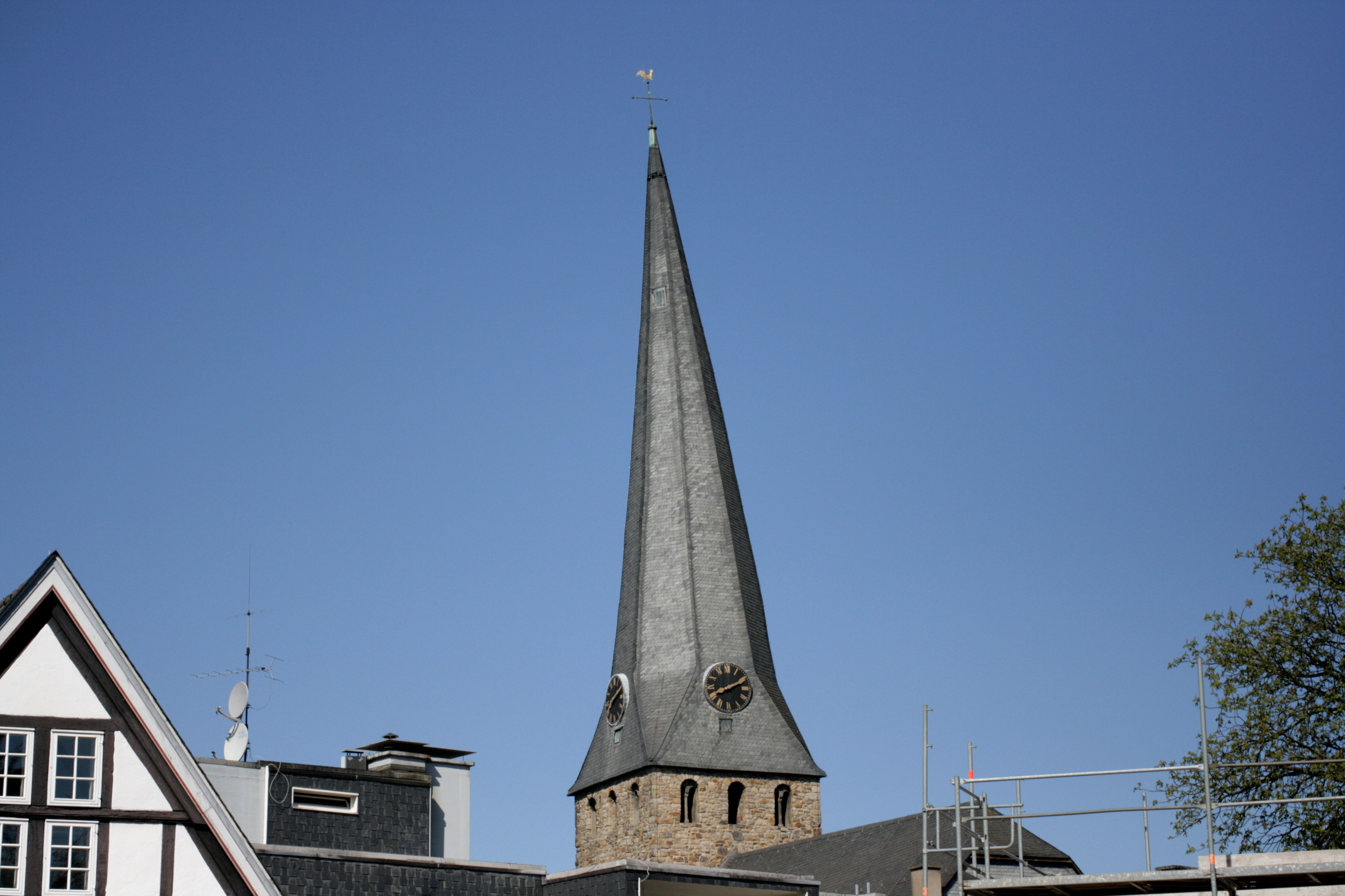 Evangelische St.-Georgs-Kirche auf dem Kirchplatz in Hattingen